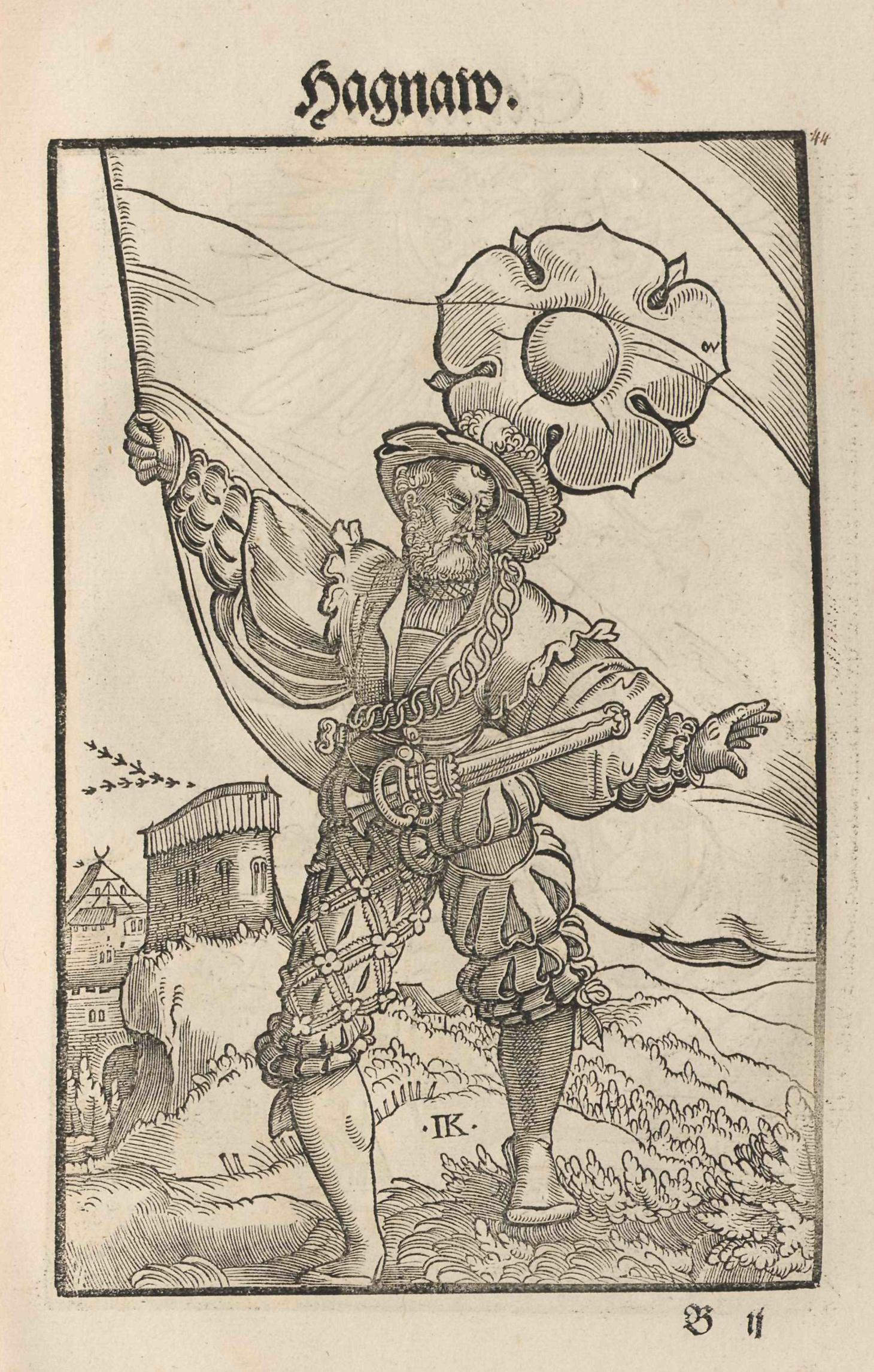 Jacob Koebel (Vorrede): Wapen. Des Heyligen Römischen Reichs Teutscher nation. Gedruckt bei Cyriacus Jacob (evtl. auch Herausgeber/Autor), Frankfurt am Main 1545, Holzschnitte von Jacob Kallenberg. Zu Angaben zur Tingierung (Farbgebung) der Wappen siehe das Register ab Bild Nr. 165. Hagnaw (Hagenau, Haguenau)